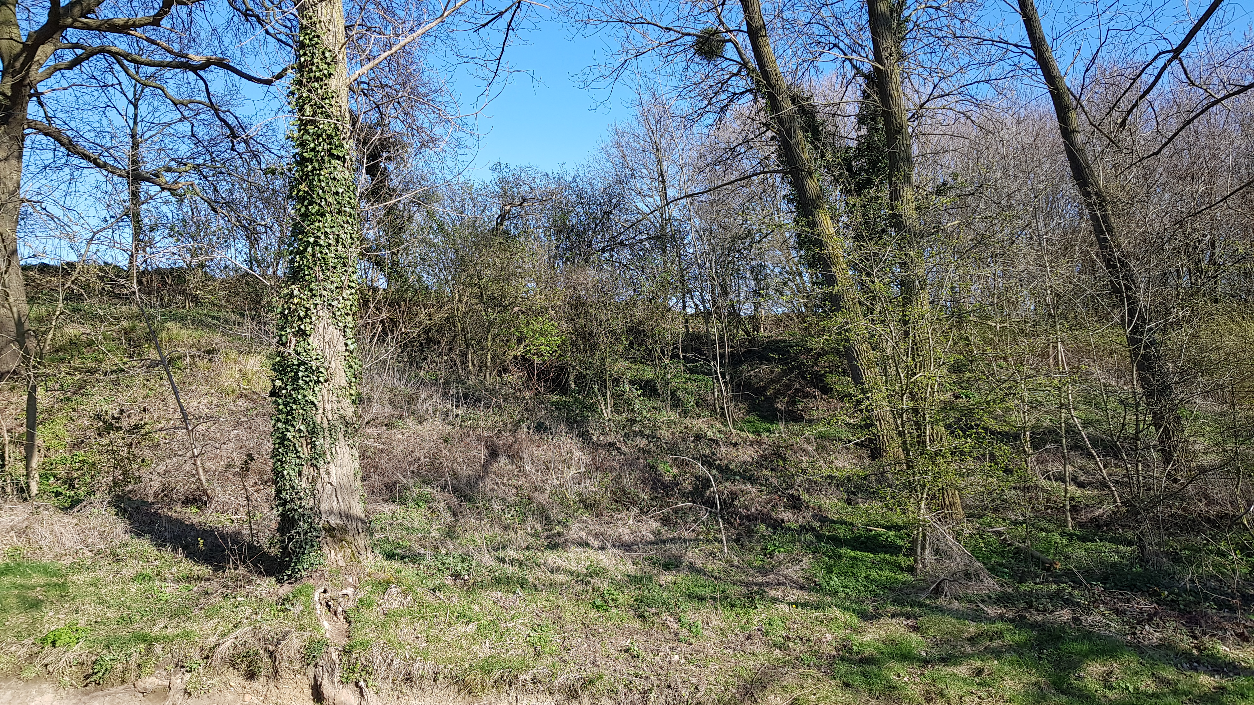 Groeve in de Grindkuil (Biebosch), Valkenburg, Nederland